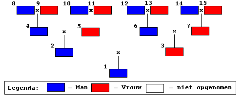 Zelf gemaakt schema